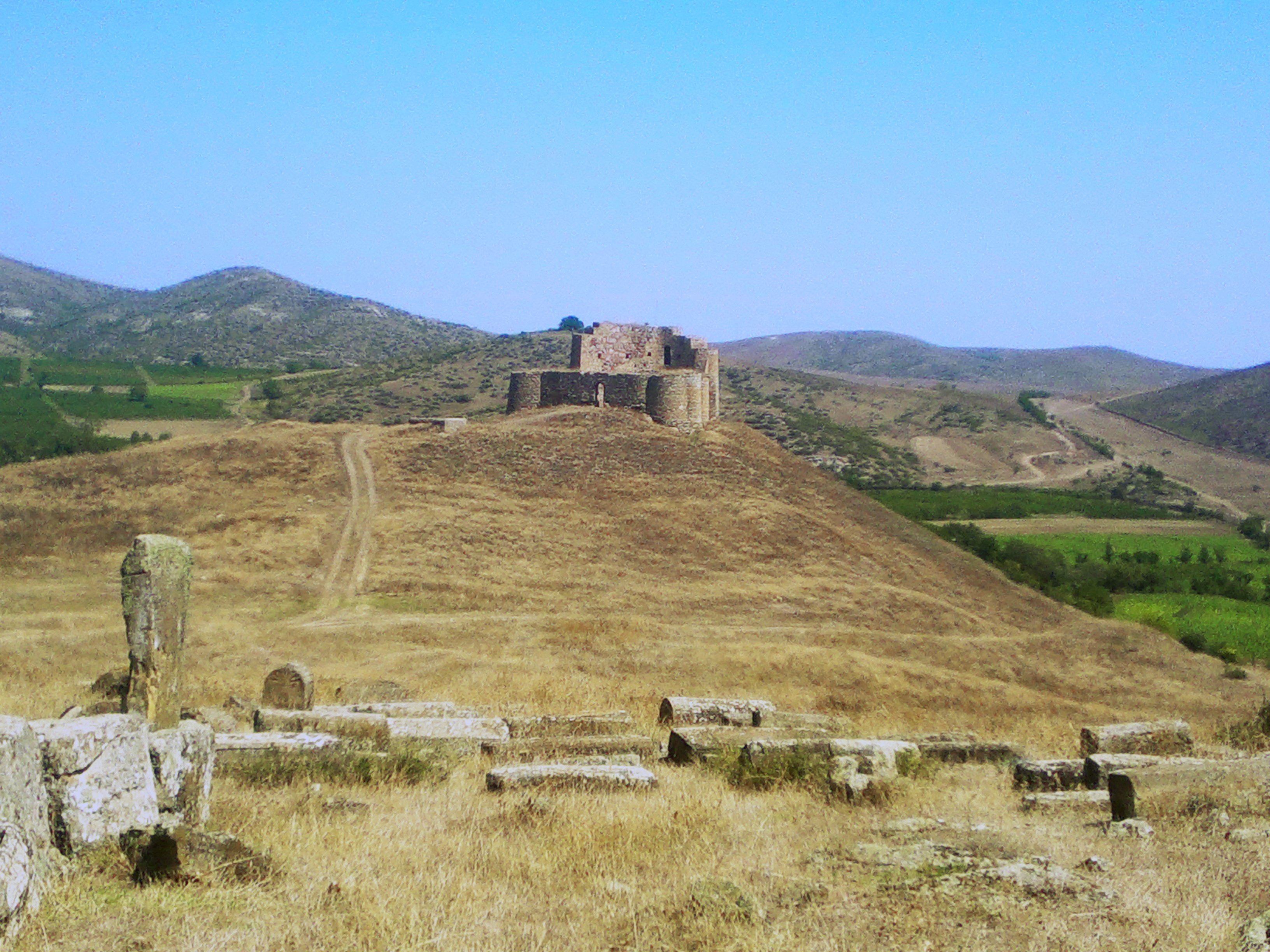 Տավուշի մարզի Բերդավան գյուղի հարավ-արևելյան կողմում գտնվող XIIIդ. բրգավոր ամրոց: 19/3